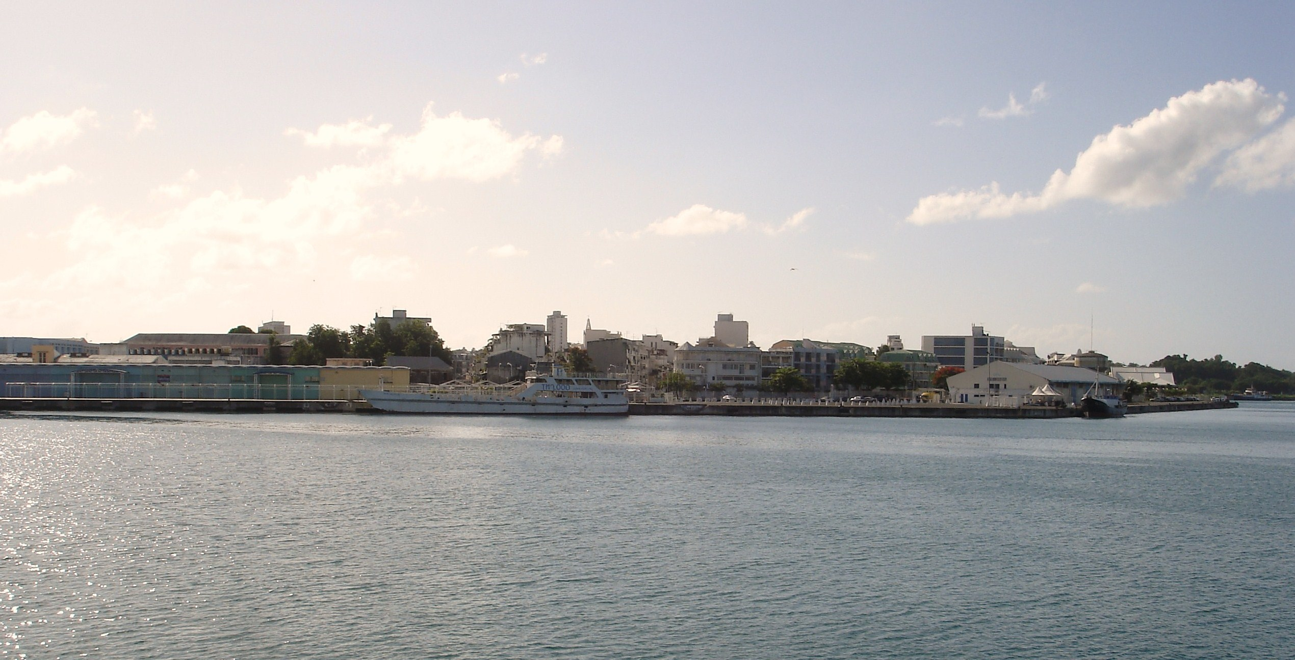 Vue sur la ville de Pointe-à-Pitre, côté port maritime : Guadeloupe - France